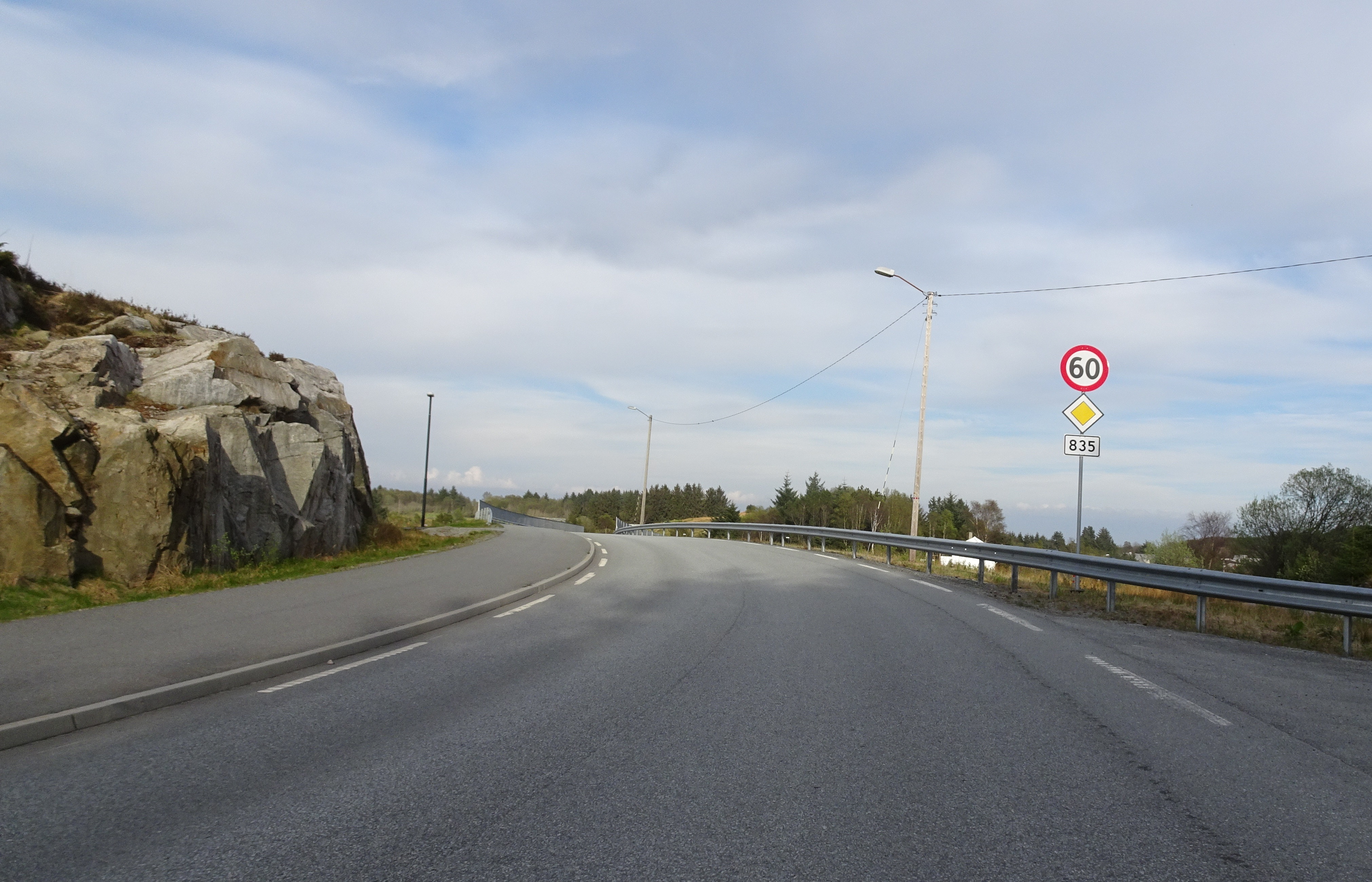 Tuastadvegen (fylkesvei 835) i Karmøy